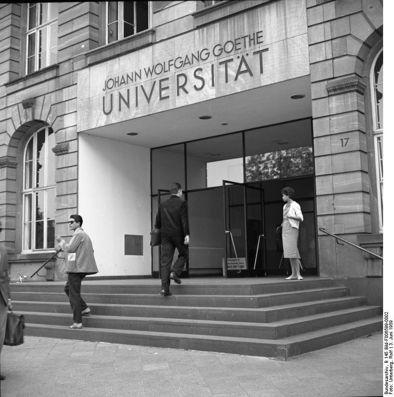 Stadtbilder Frankfurt/Main Eingang zur Johann Wolfgang von Goethe Universität